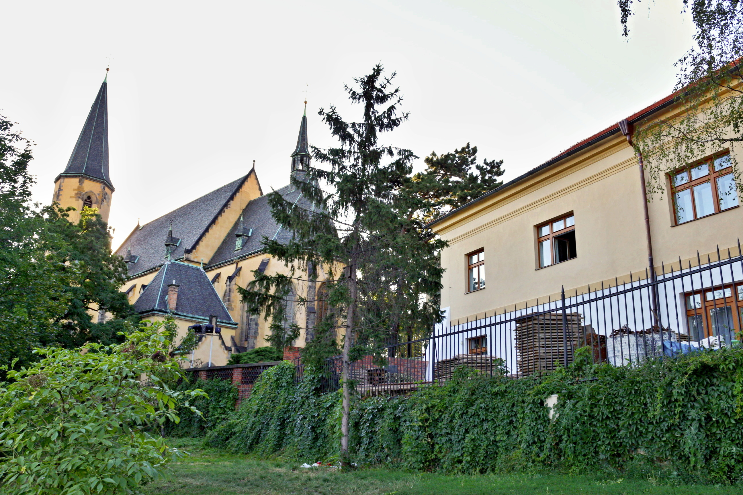 Kostel svatého Apolináře v Praze